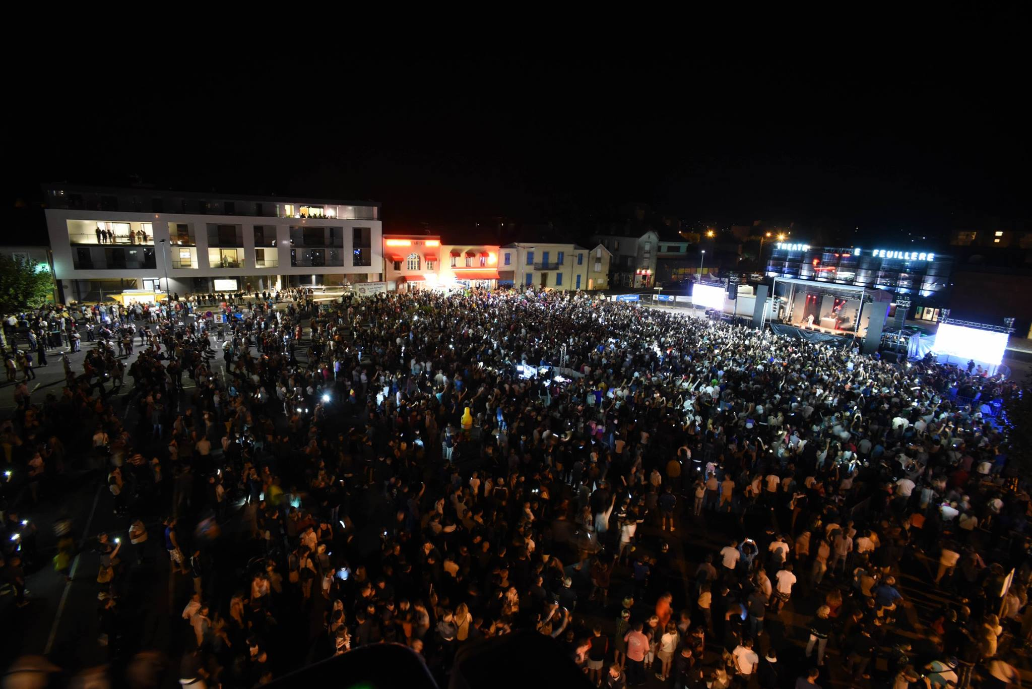 Vesoul - Concert 2016 place Rénet